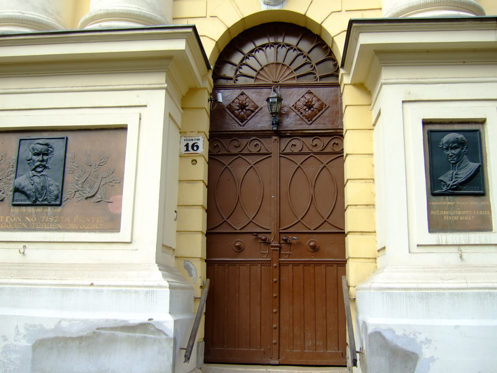 Ref. kollégium (Debrecen, Kálvin tér) This is a photo of a monument in Hungary. Identifier: 5236